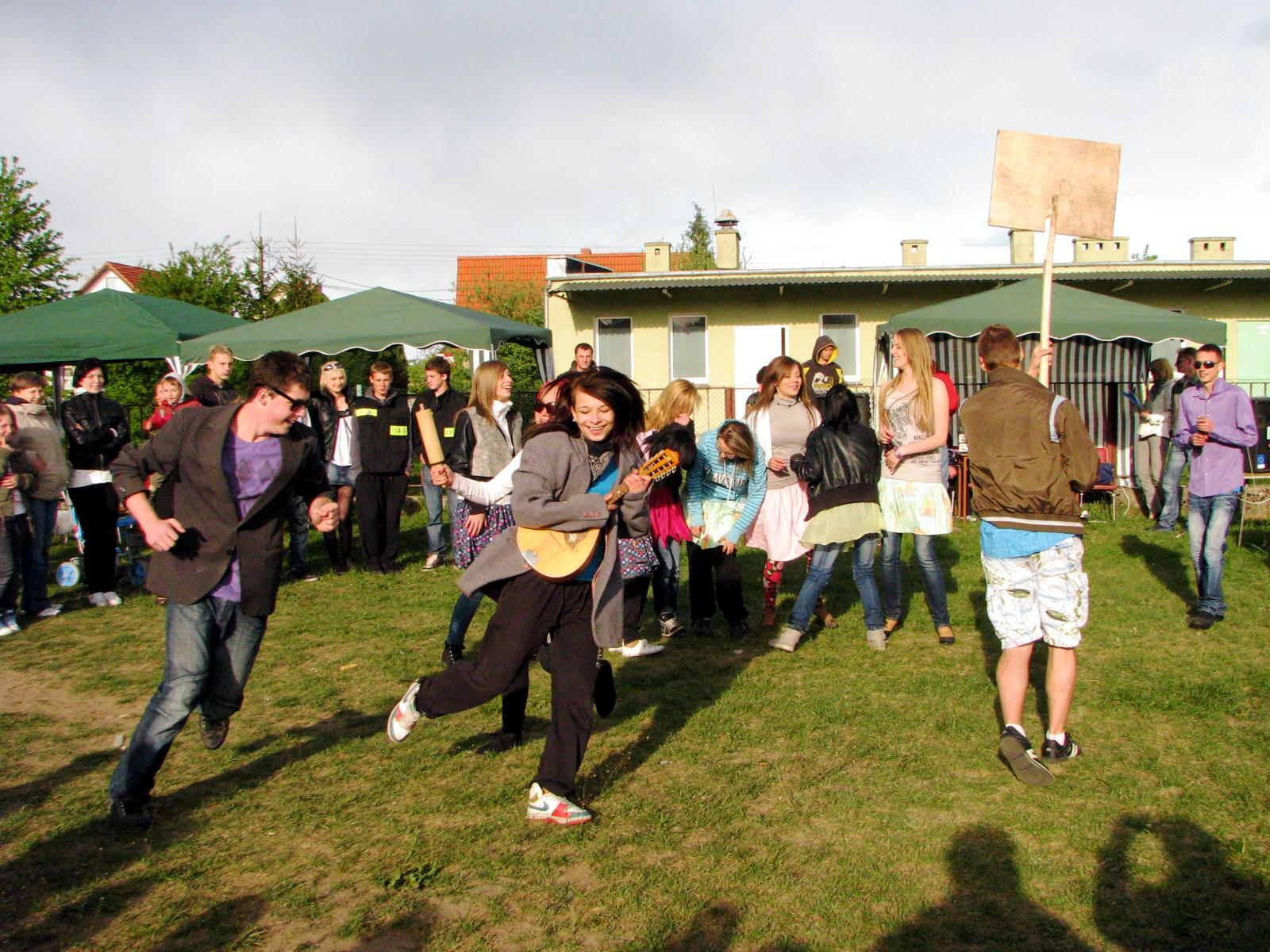 Wojcieszyce. Młodzież na festynie majowym